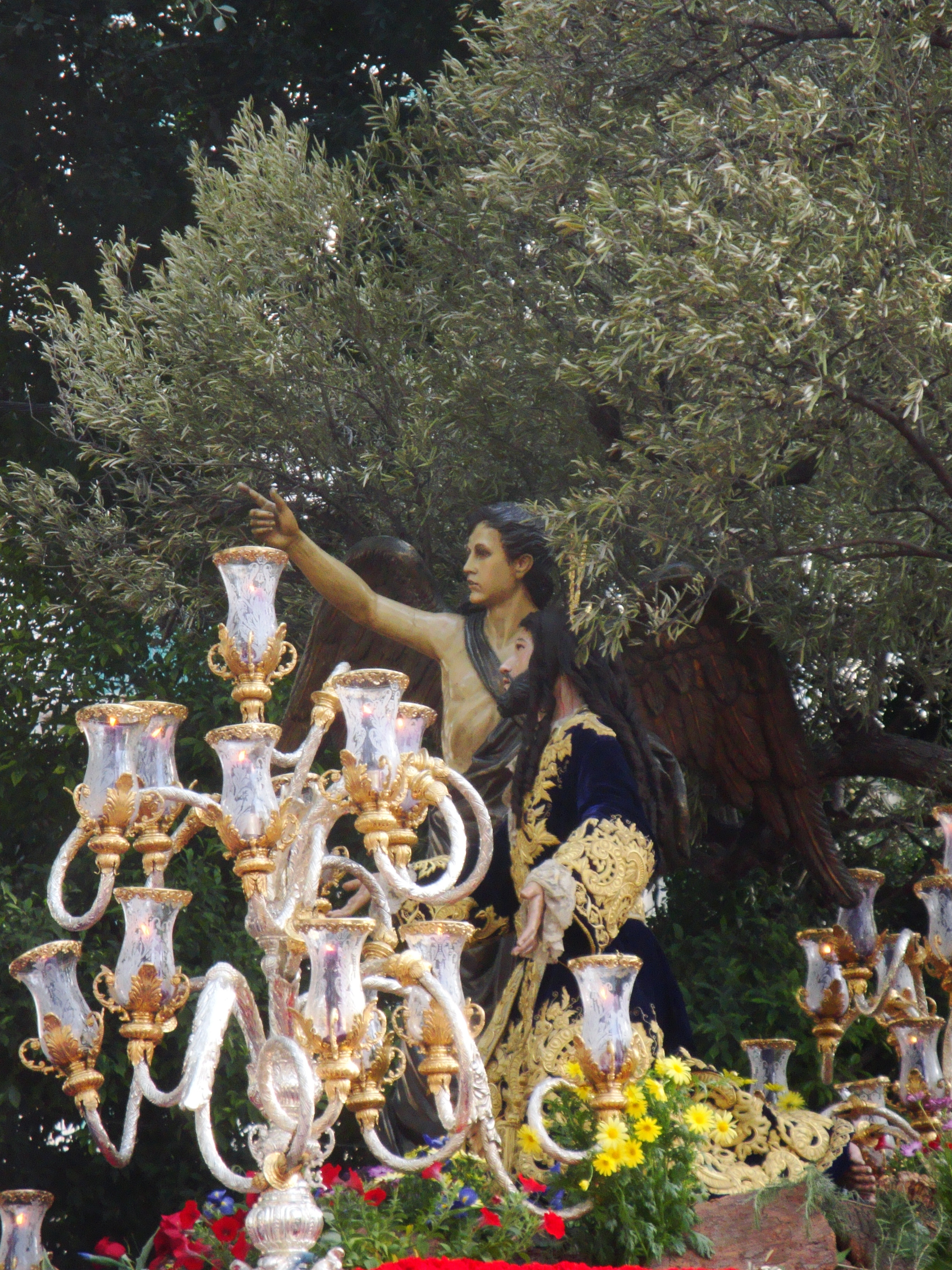 2010 Holy Week in Málaga